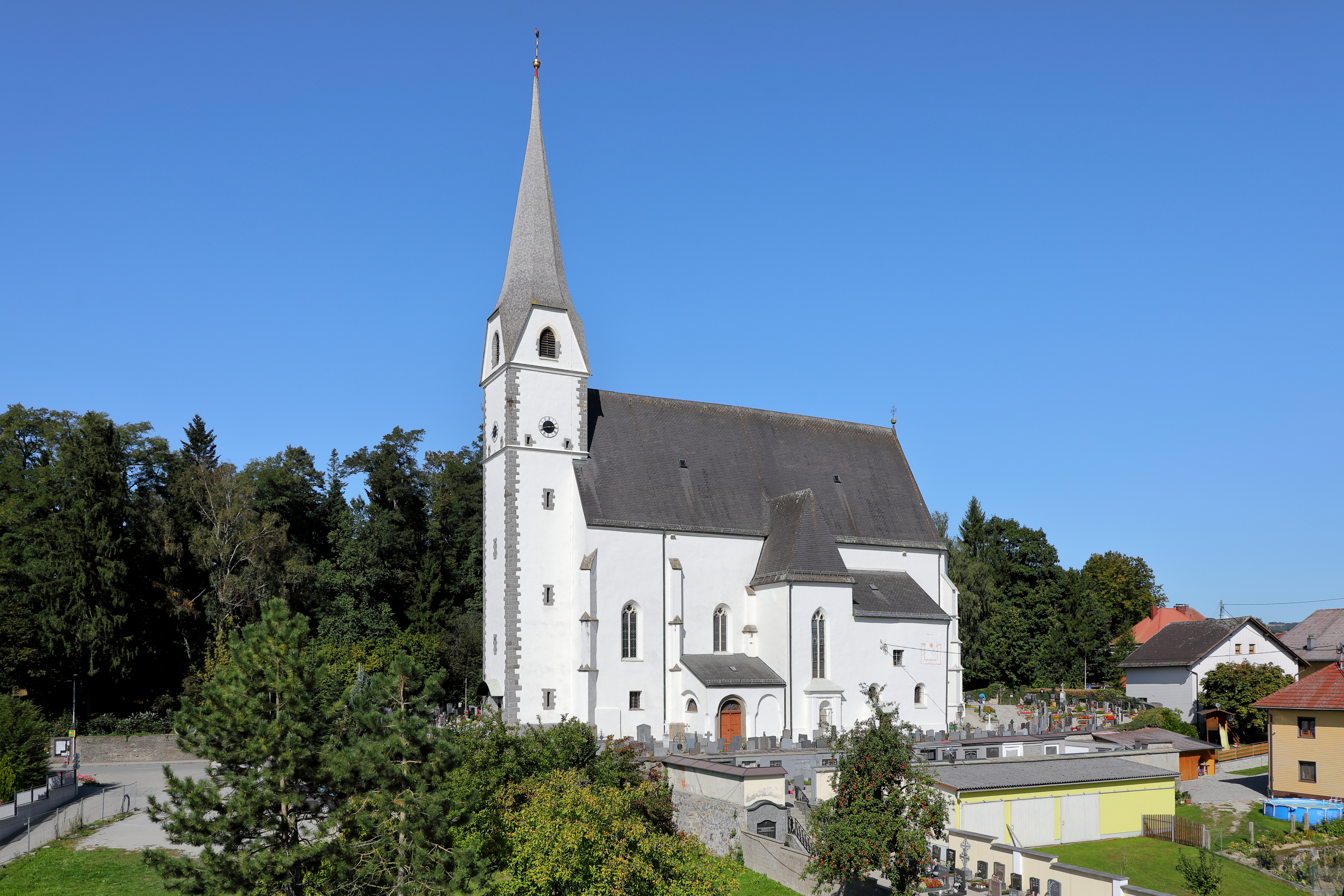 Südsüdwestansicht der röm.-kath. Pfarrkirche Mariä Verkündigung der oberösterreichischen Marktgemeinde Taufkirchen an der Pram.Die auf einem Hügel situierte gotische Kirche wurde nach der Mitte des 15. Jahrhunderts vermutlich durch den Baumeister Stephan Krumenauer erbaut. Der Turm stürzte 1922 ein und wurde 1923 in der alten Form wieder aufgebaut.